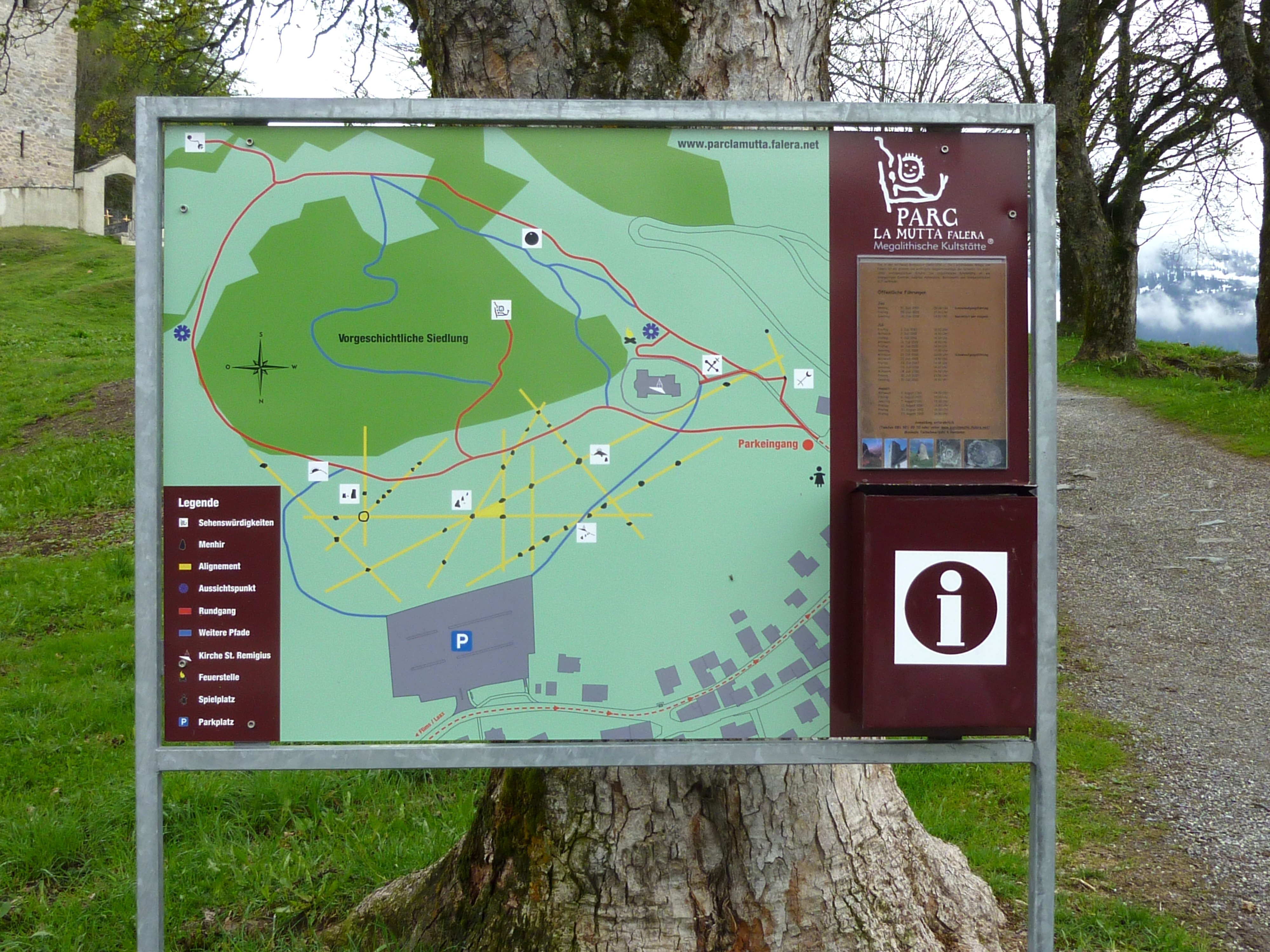 Parc la Mutta: Mondstein